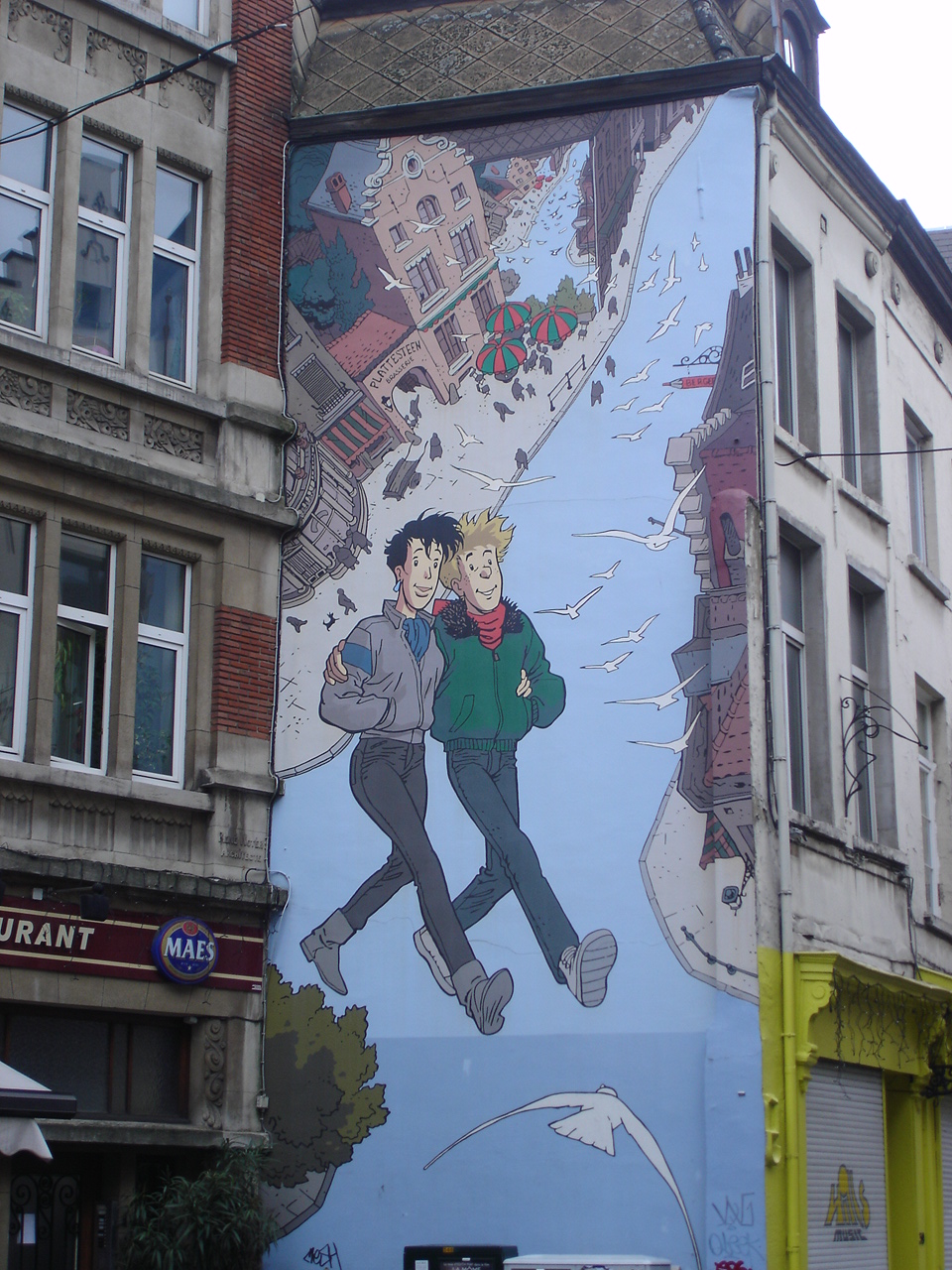 mur peint à Bruxelles